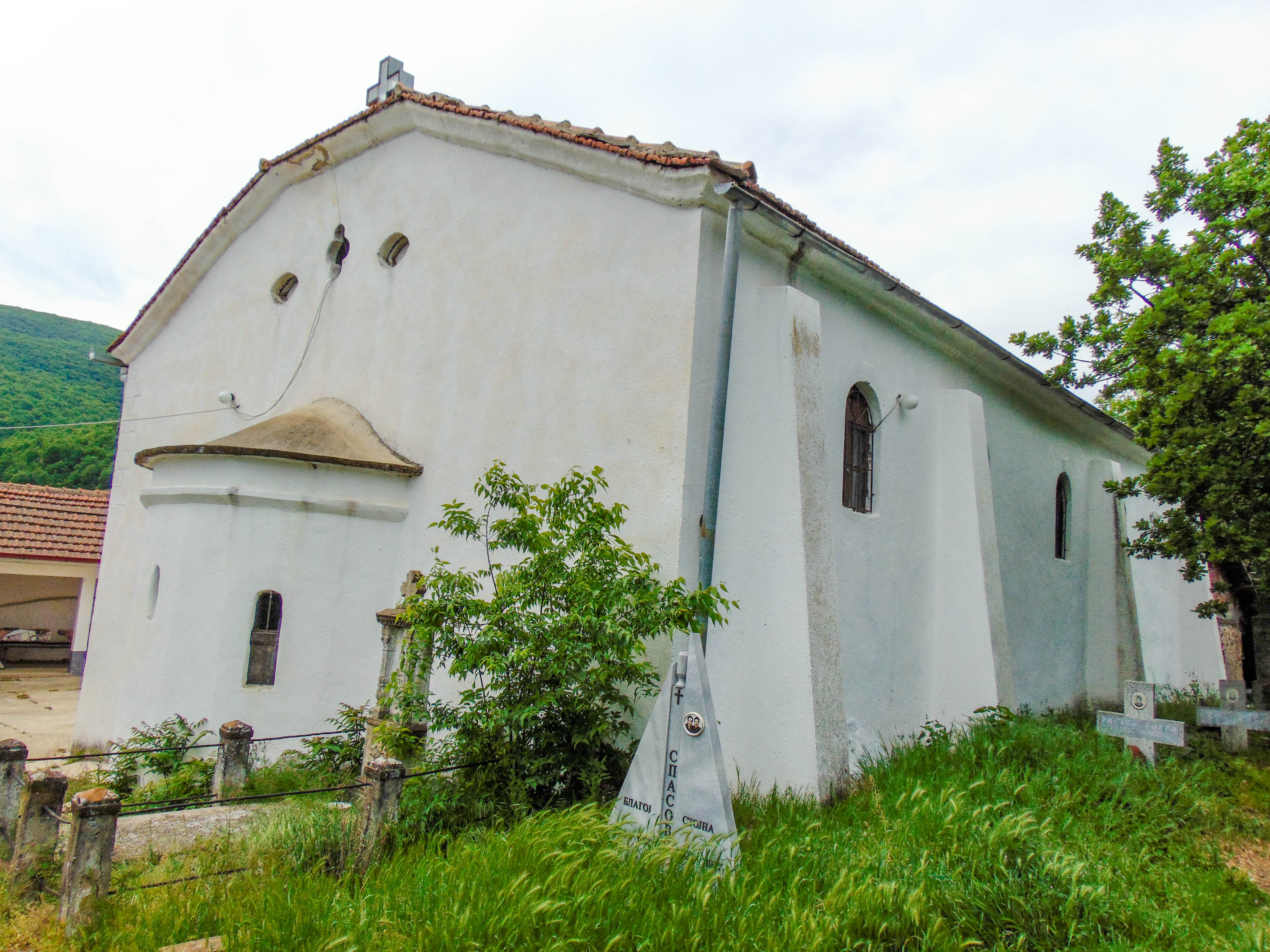 Црква „Св. Ѓорѓи“ - Воиславци